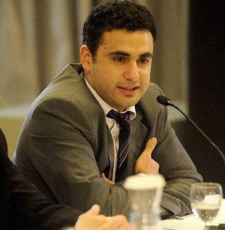 Iván Heyn, político y economista argentino (1977-2011), ex subsecretario de Comercio Exterior de la Nación.